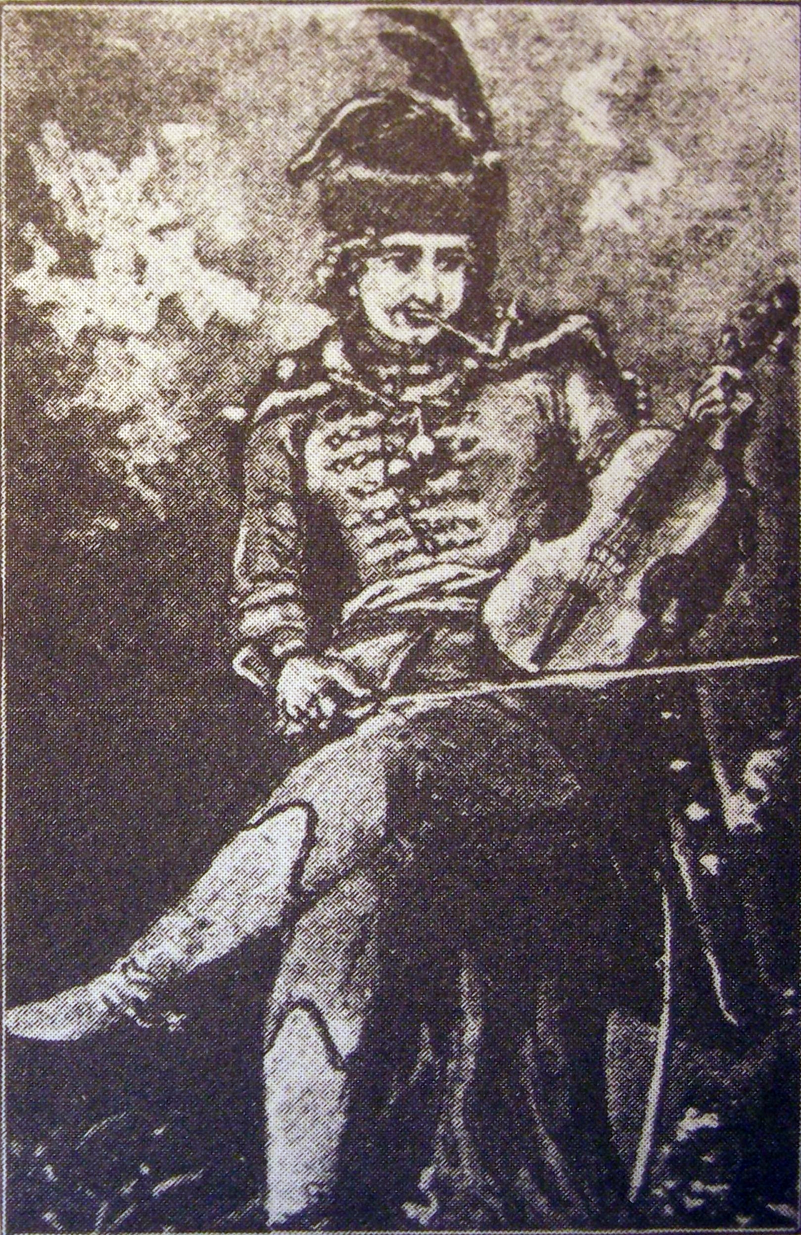 Czinka Panna vagy Cinka Panna (Sajógömör, 1711 – Nagyvárad 1772) legendás magyar cigányzenész, virtuóz hegedűs, az első mai értelemben vett cigányprímás